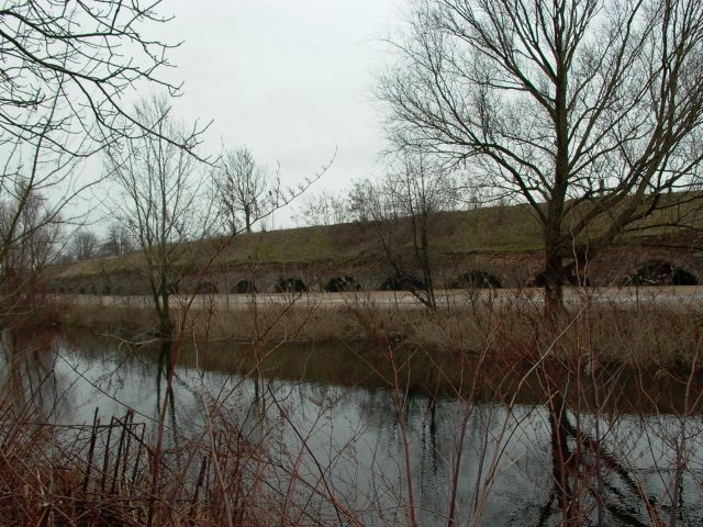 Fotografia przedstawia ruiny koszar szyjowych Fortu VI "Okęcie" Twierdzy Warszawa. Autor: Zbigniew Strucki